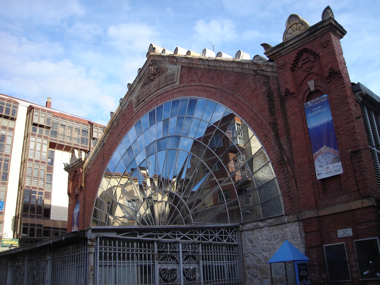 The covered market (Mercado de abastos) en Zamora, Spain (España)